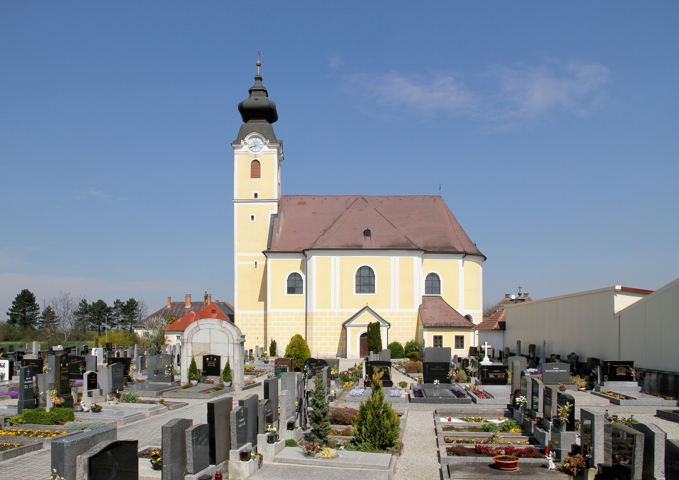 Die kath. Pfarrkirche hl. Nikolaus in der niederösterreichischen Marktgemeinde Langenrohr.